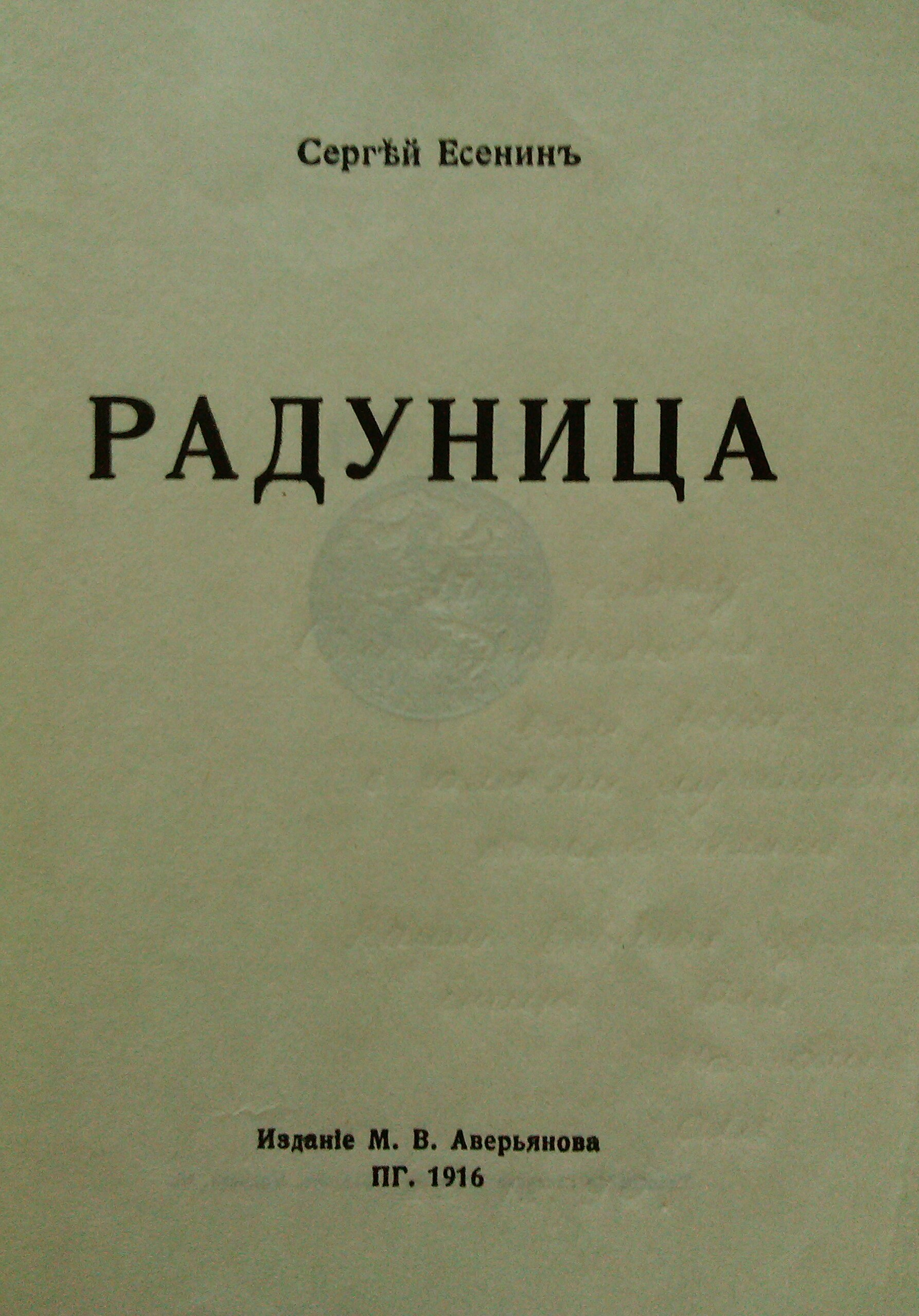 Первый сборник стихов С. Есенина, 1916 год